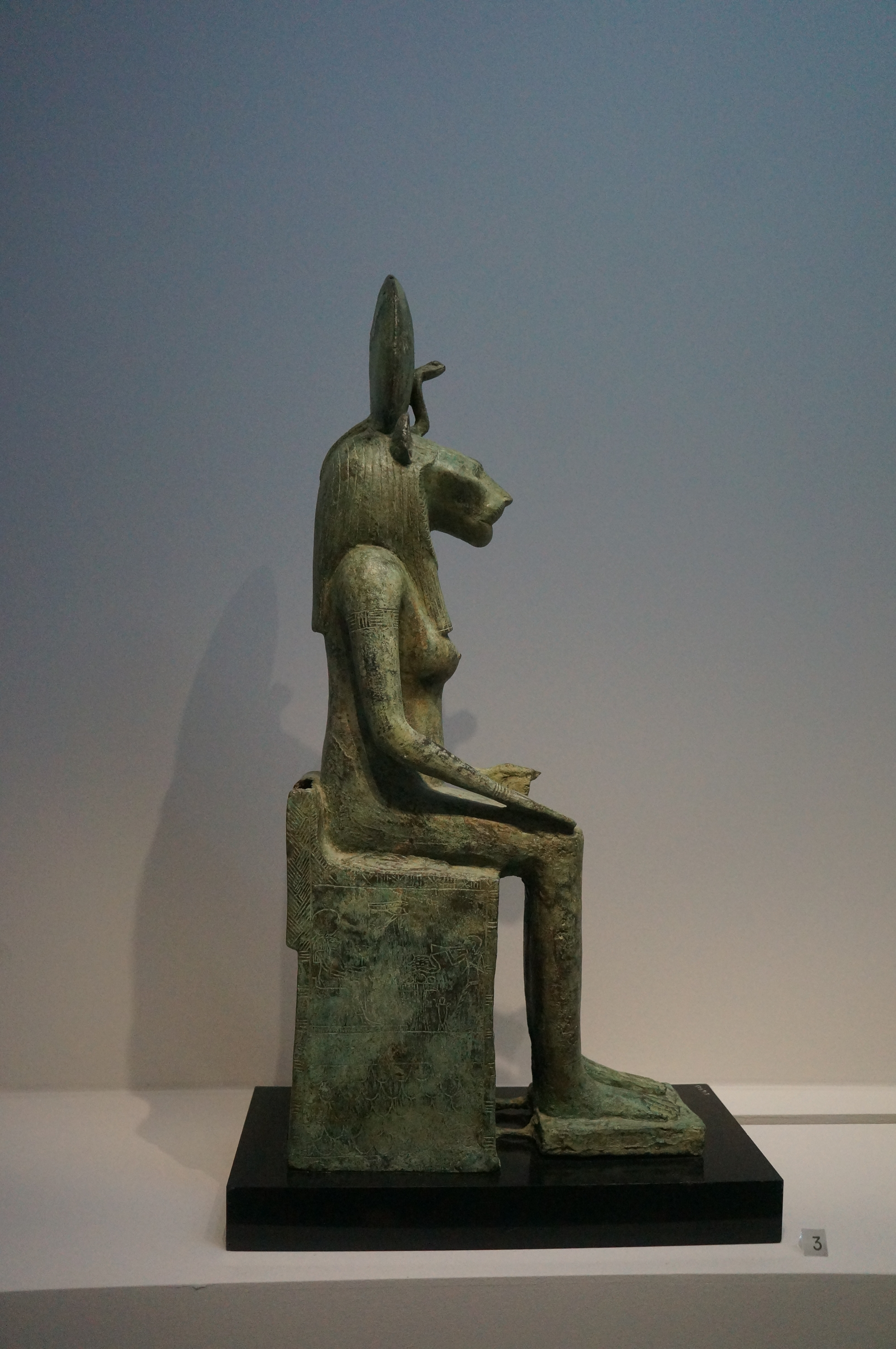 Statue de la déesse Ouadjet, bronze, fin de la Basse Epoque ou début de la période ptolémaïque. Provenance : Bouto (?). Paris: Musée du Louvre département des antiquité égyptiennes E14719. Musée Louvre-Lens à Lens, Pas-de-Calais, Hauts-de-France, France.